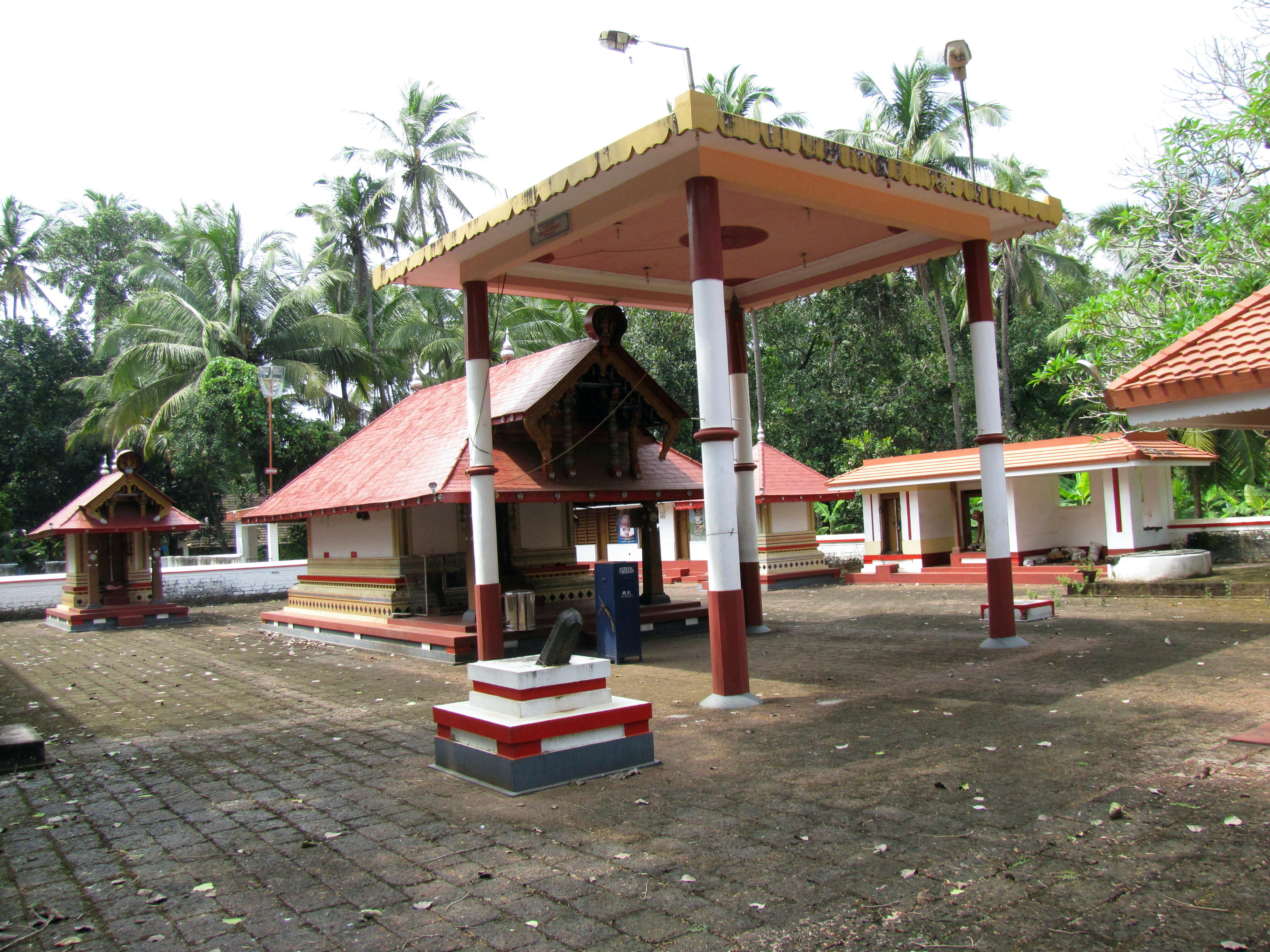 Sri Pullikkarinkaliyamma Devasthanam, Kizhakkumkara, Kanhangad, Kasargod